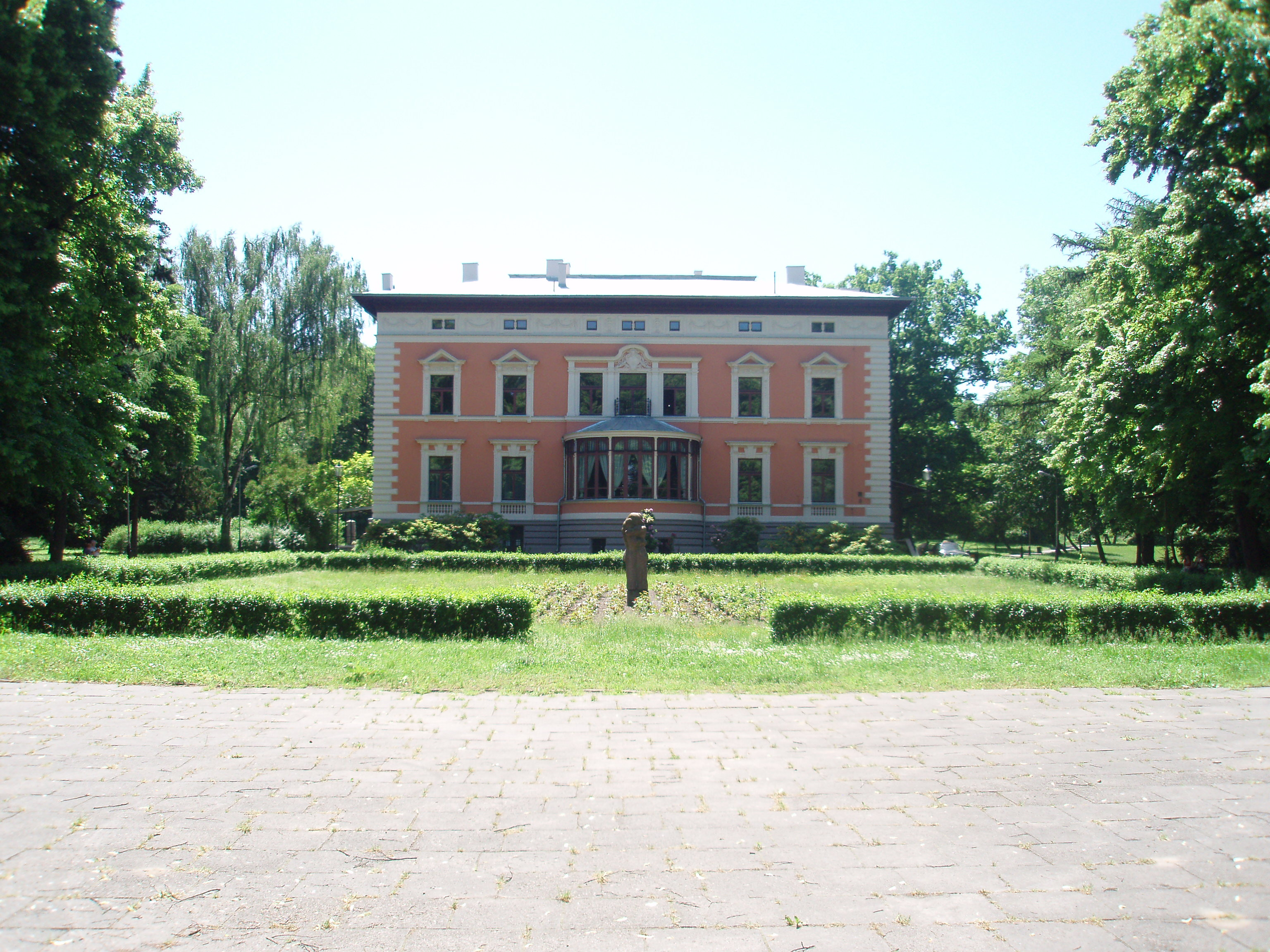 Budynek USC Łódź Górna w Parku im. Legionów, widok od północy, od ulicy Pabianickiej